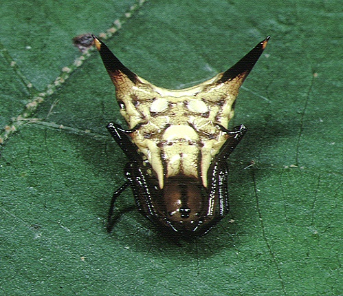 Micrathena acuta from Ecuador.